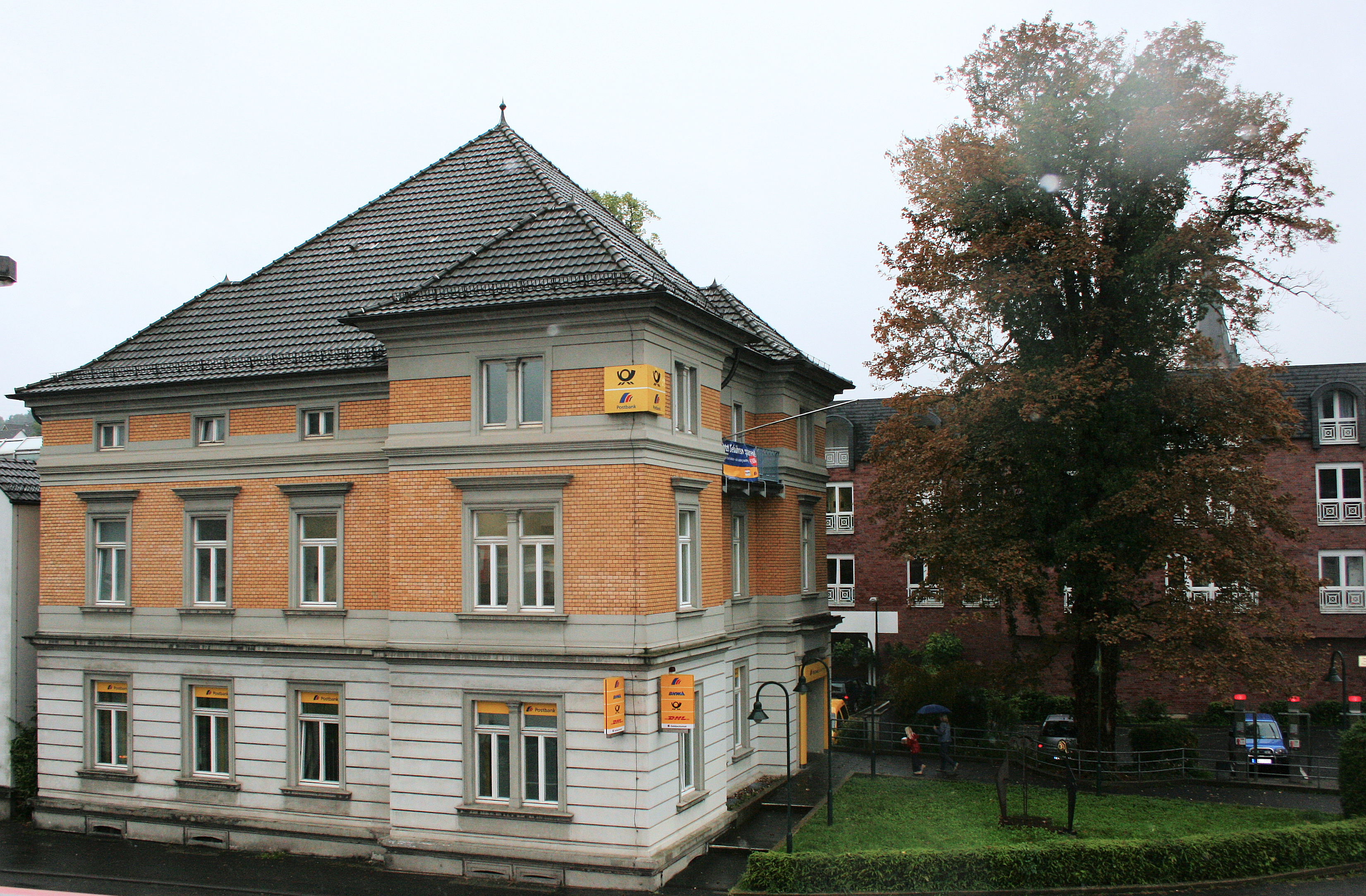 Post Eitorf